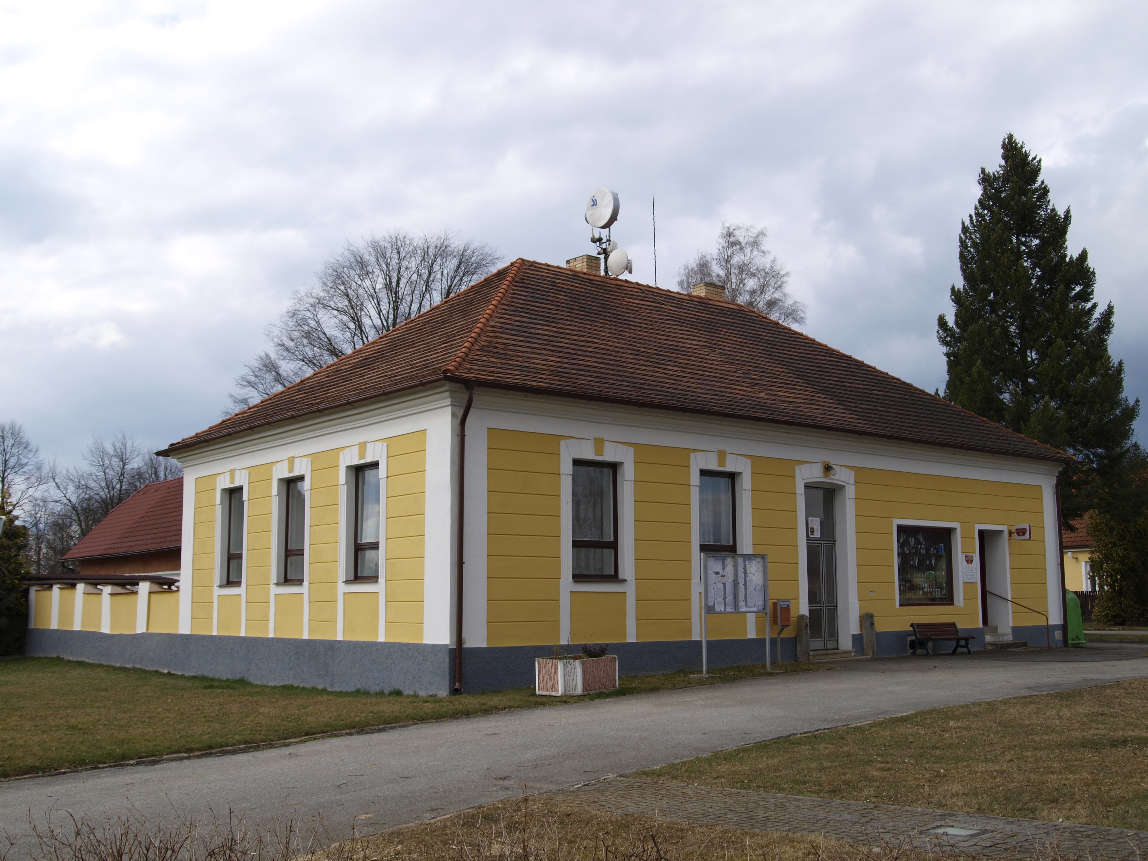 Slavošovice, okres České Budějovice, Malé muzeum piva Project: Fotíme Česko.